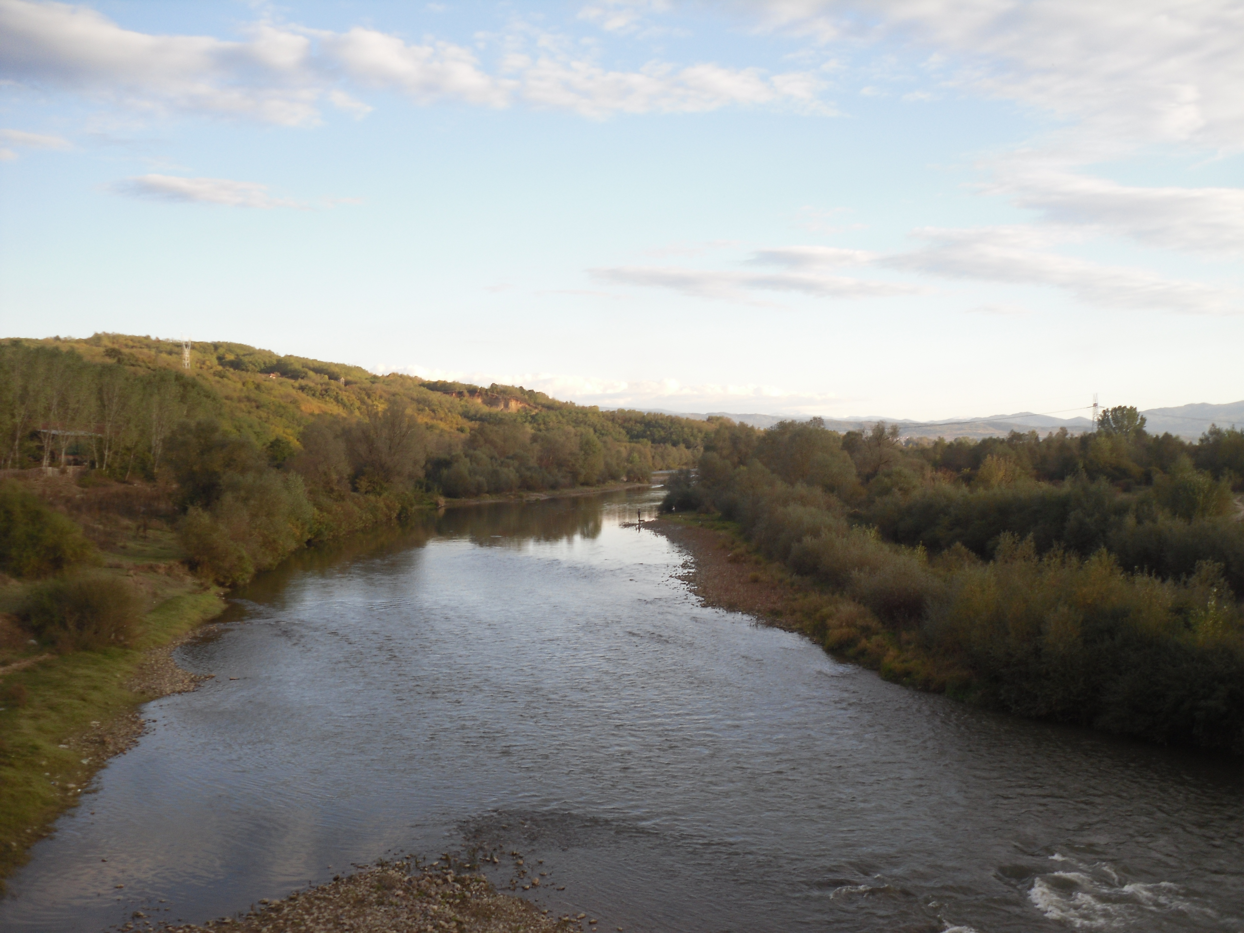 Srpski (latinica): Južna Morava između Manojlovca i Slatine.